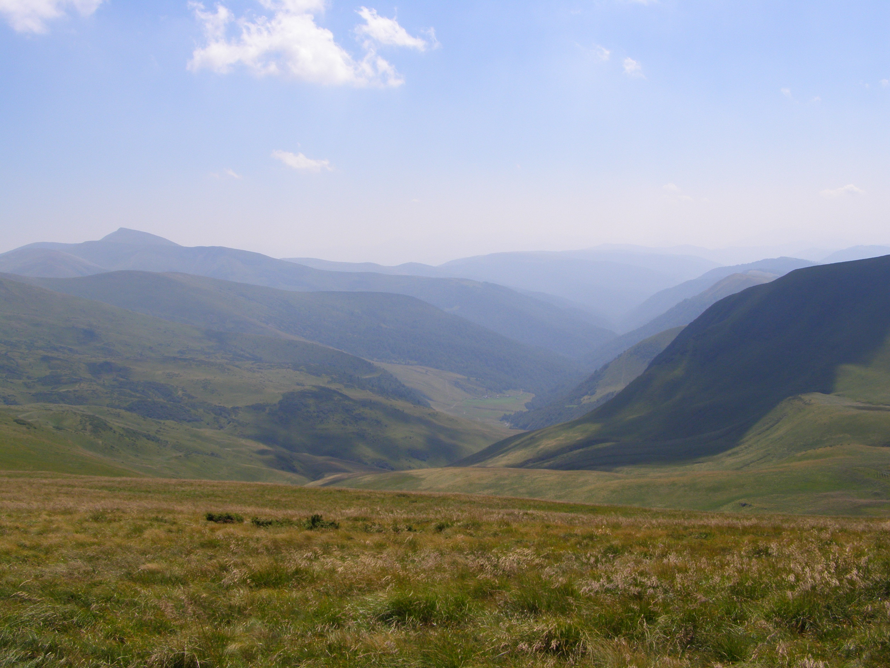 Svydovec, údolí řeky Kosovskaja, vlevo vrchol Blyznyca (1881 m, nejvyšší hora pohoří)